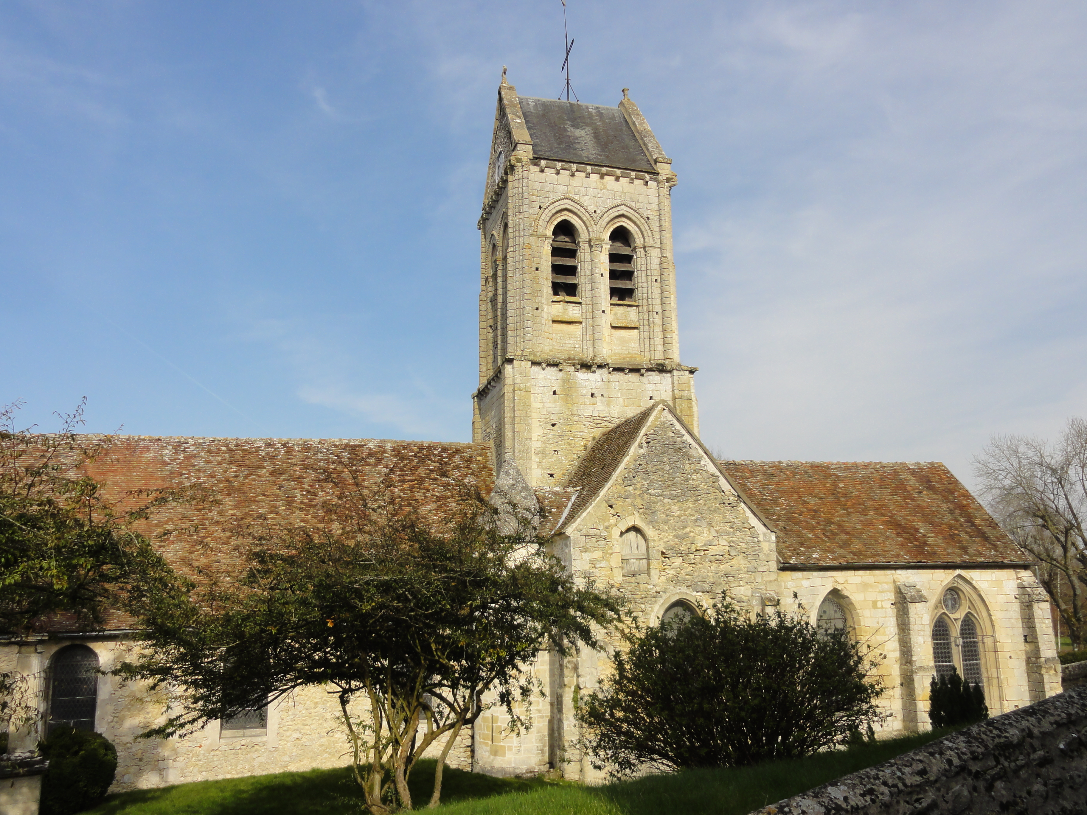 Église Saint-Léger de Delincourt - voir titre.